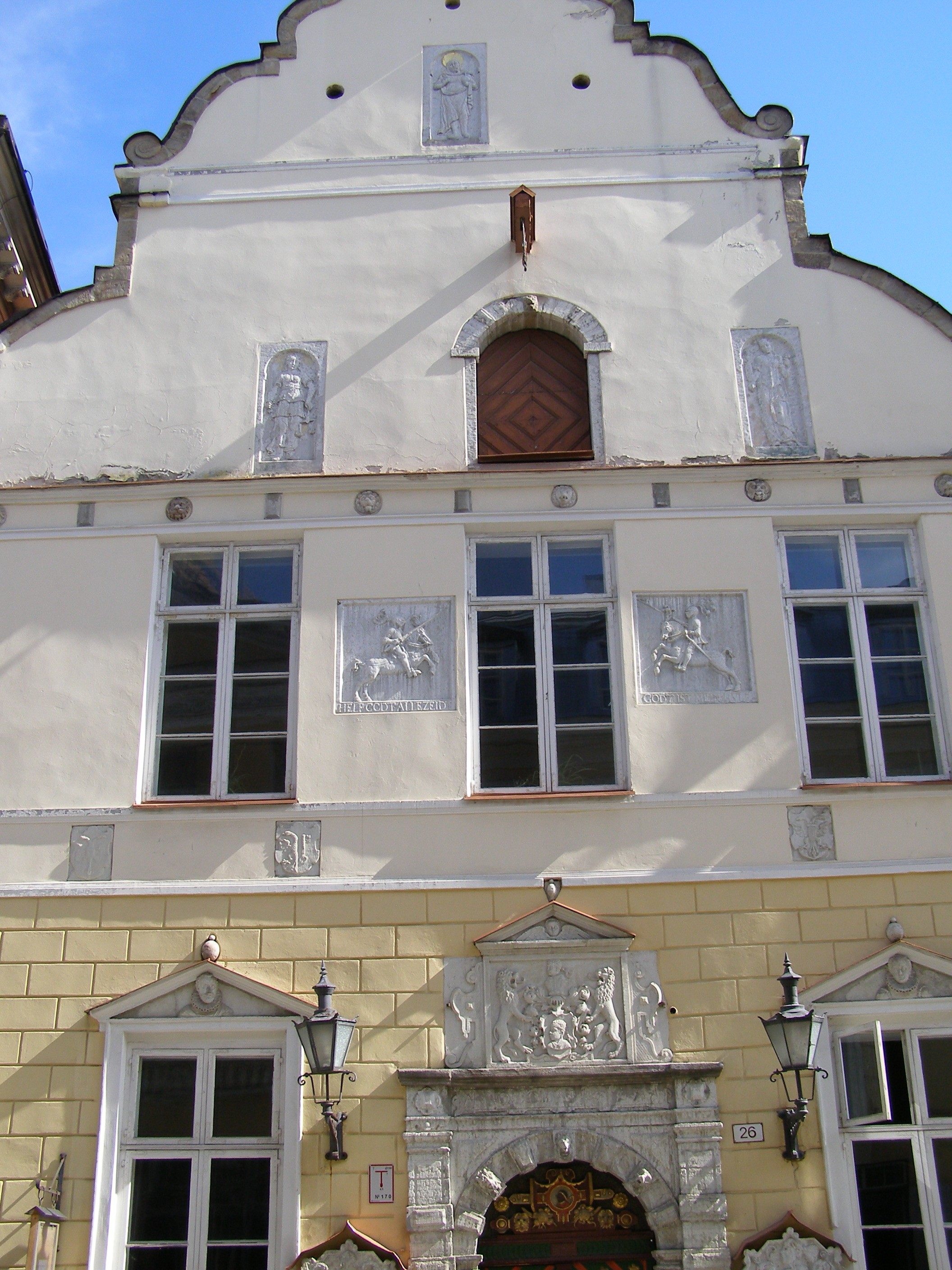 Tallinn, House of the Brotherhood of the Blackheads Tallinn, Haus der Bruderschaft der Schwarzhäupter Tallin, Dům bratrství černých hlav